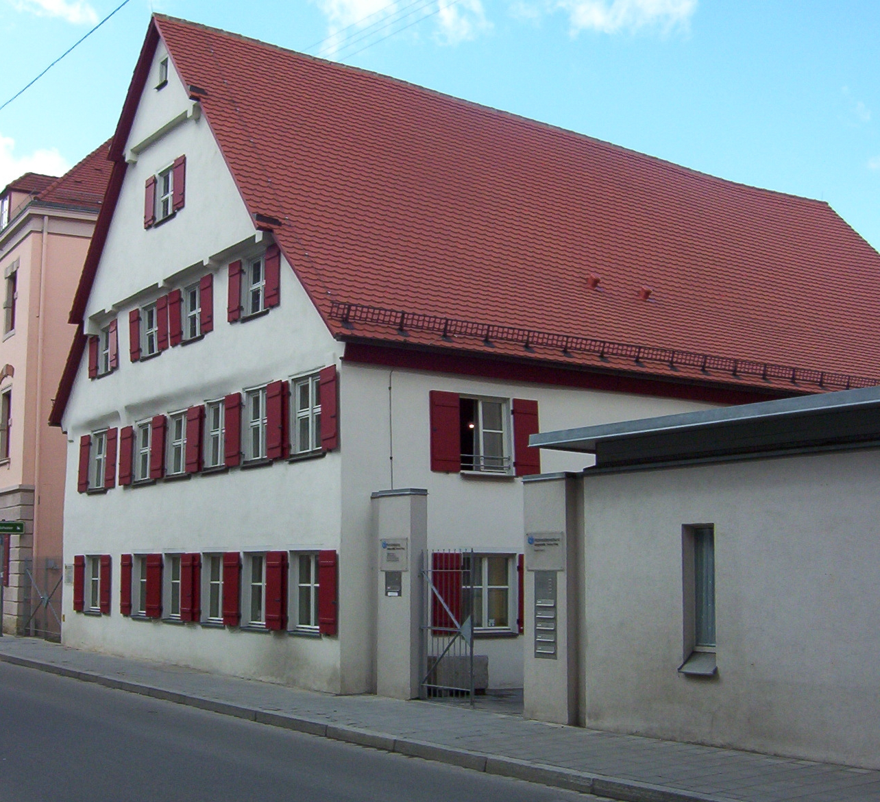 Gerd Müller's birthplace